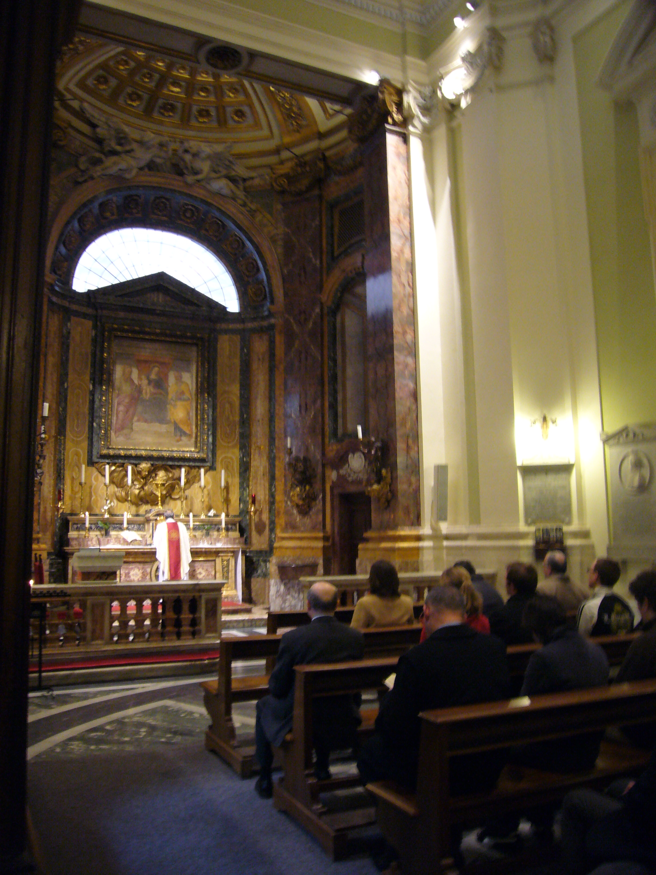 Roma, Basilica di Sant'Apollinare, interno dell'atrio col fresco venerato della Madonna dell'Apollinare